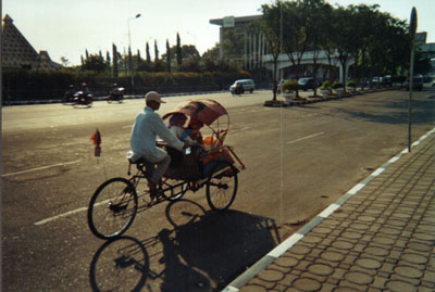 Straatbeeld in Soerabaja, Indonesië, met op de voorgrond een becak. Door: V. van den Berg